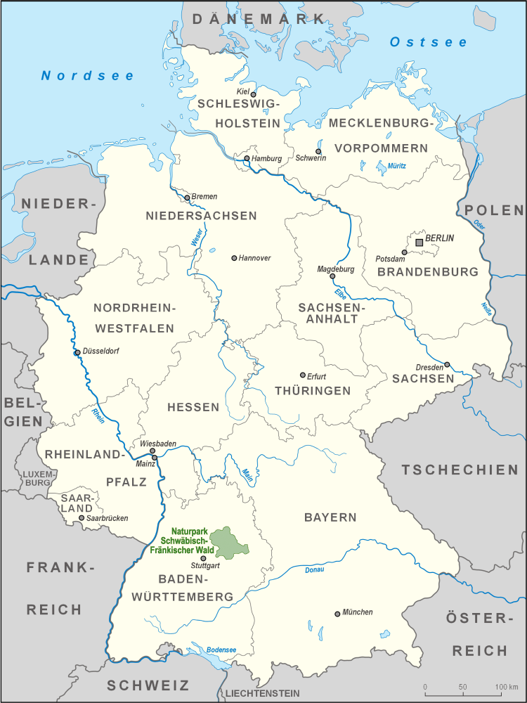 Karte des Naturparks Schwäbisch-Fränkischer Wald in Deutschland